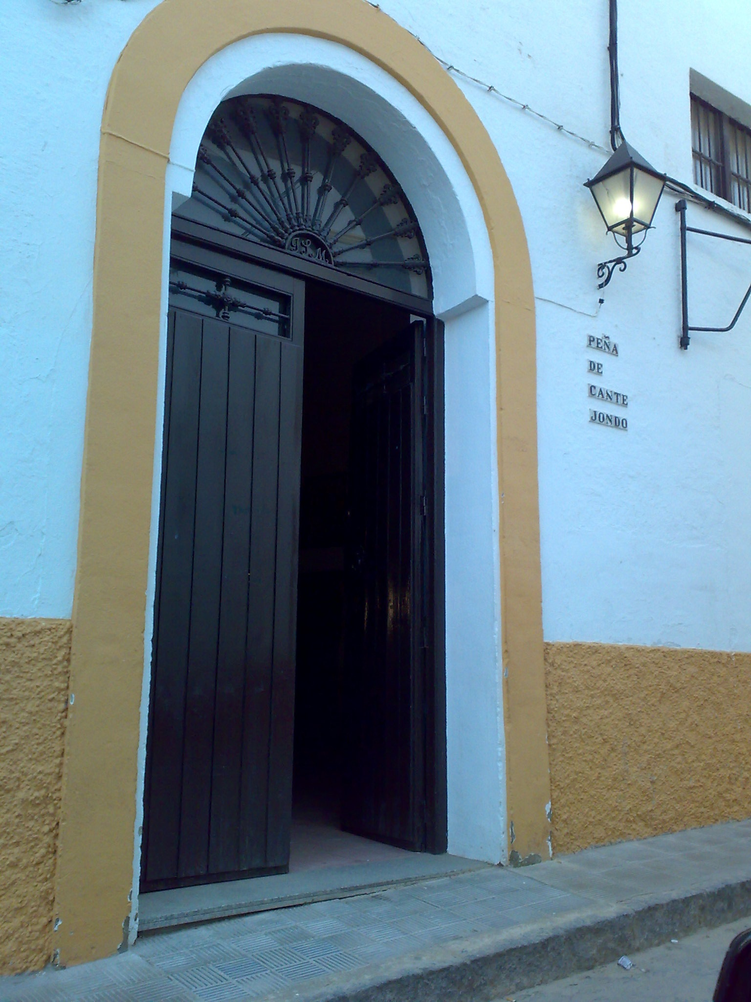 Peña de Cante Jondo o Flamenca de Moguer. (España)